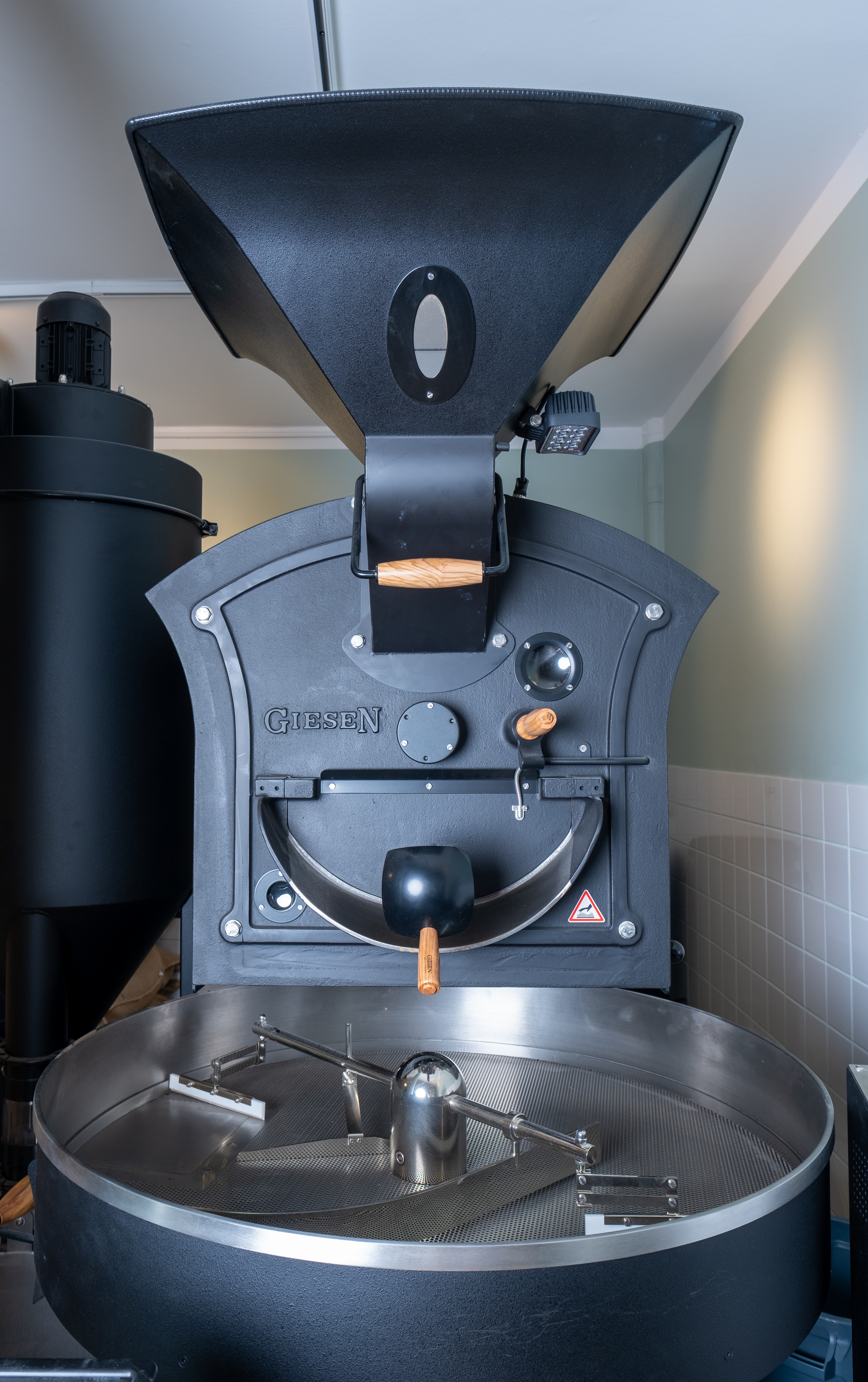 Kafferösterei Suedhang in Tübingen